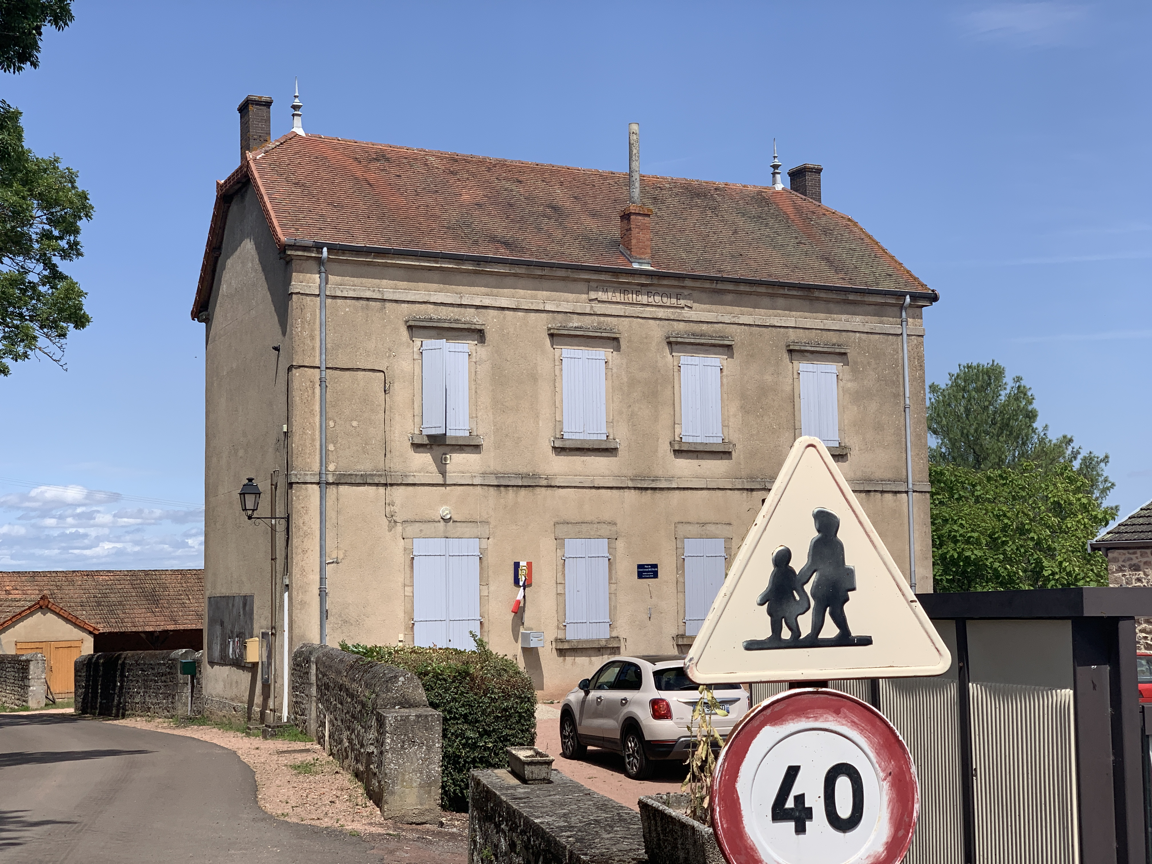 Mairie de Pressy-sous-Dondin.